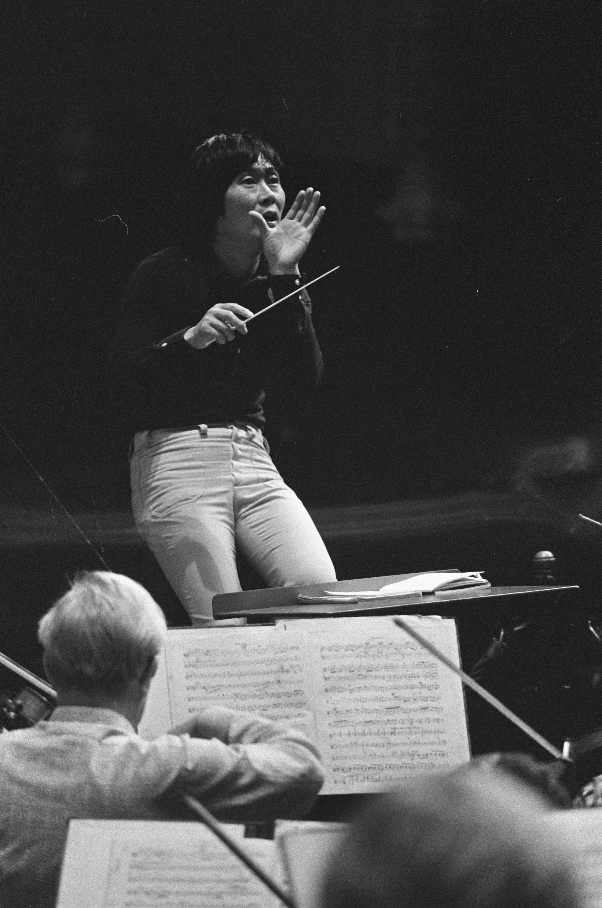 Collectie / Archief : Fotocollectie Anefo Reportage / Serie : [ onbekend ] Beschrijving : Japanse gastdirigent Ken Kobayashi in Concertgebouw Amsterdam; Ken Kobayashi in aktie Datum : 23 september 1975 Locatie : Amsterdam, Noord-Holland Trefwoorden : gastdirigenten Persoonsnaam : Kobayashi, Ken Fotograaf : Verhoeff, Bert / Anefo Auteursrechthebbende : Nationaal Archief Materiaalsoort : Negatief (zwart/wit) Nummer archiefinventaris : bekijk toegang 2.24.01.05 Bestanddeelnummer : 928-1669